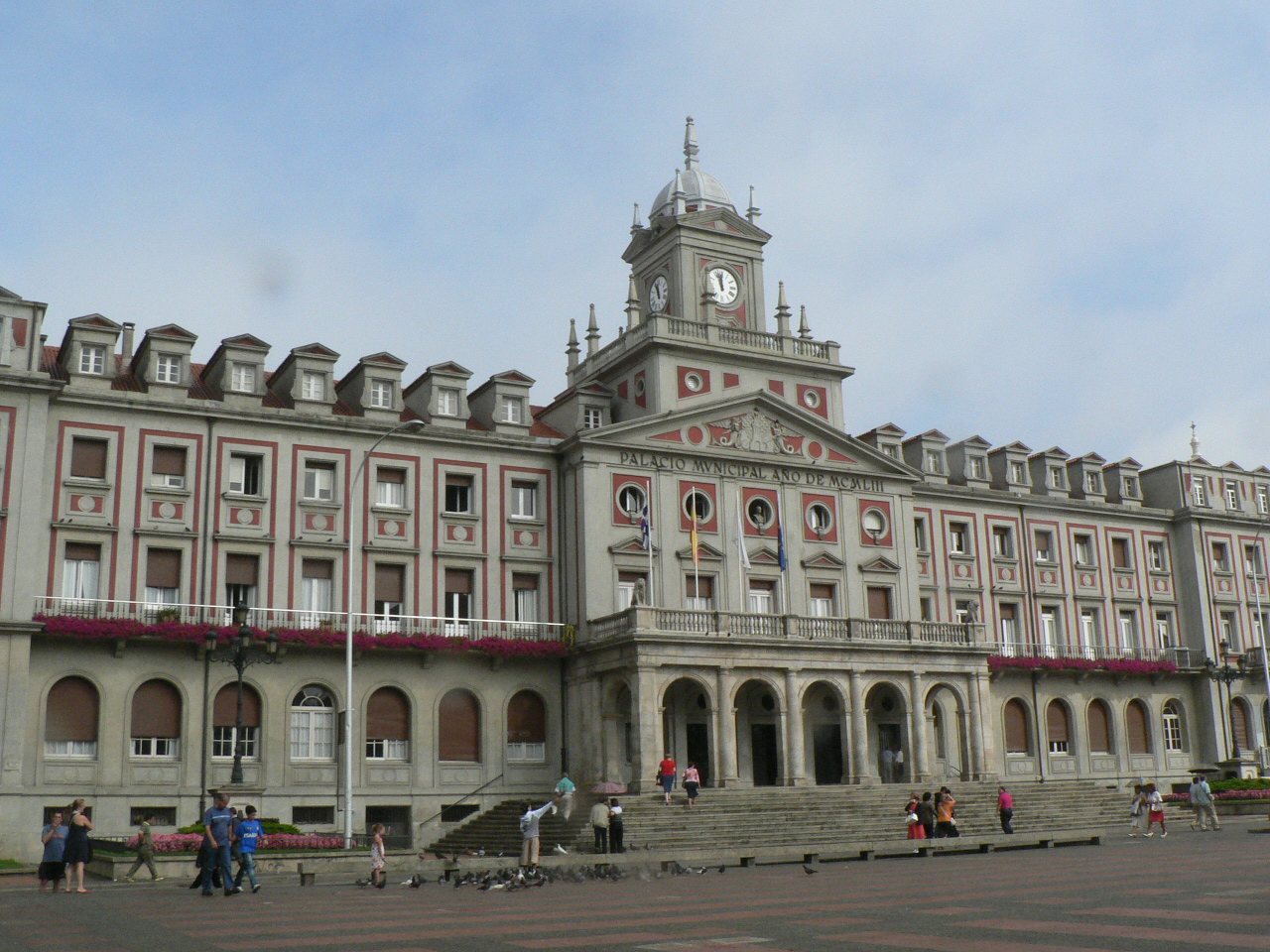 Casa do Concello (Town Hall) Ferrol